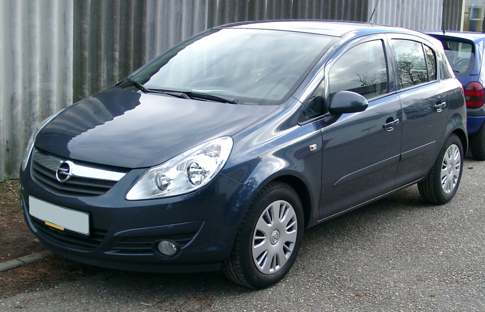 Opel Corsa D